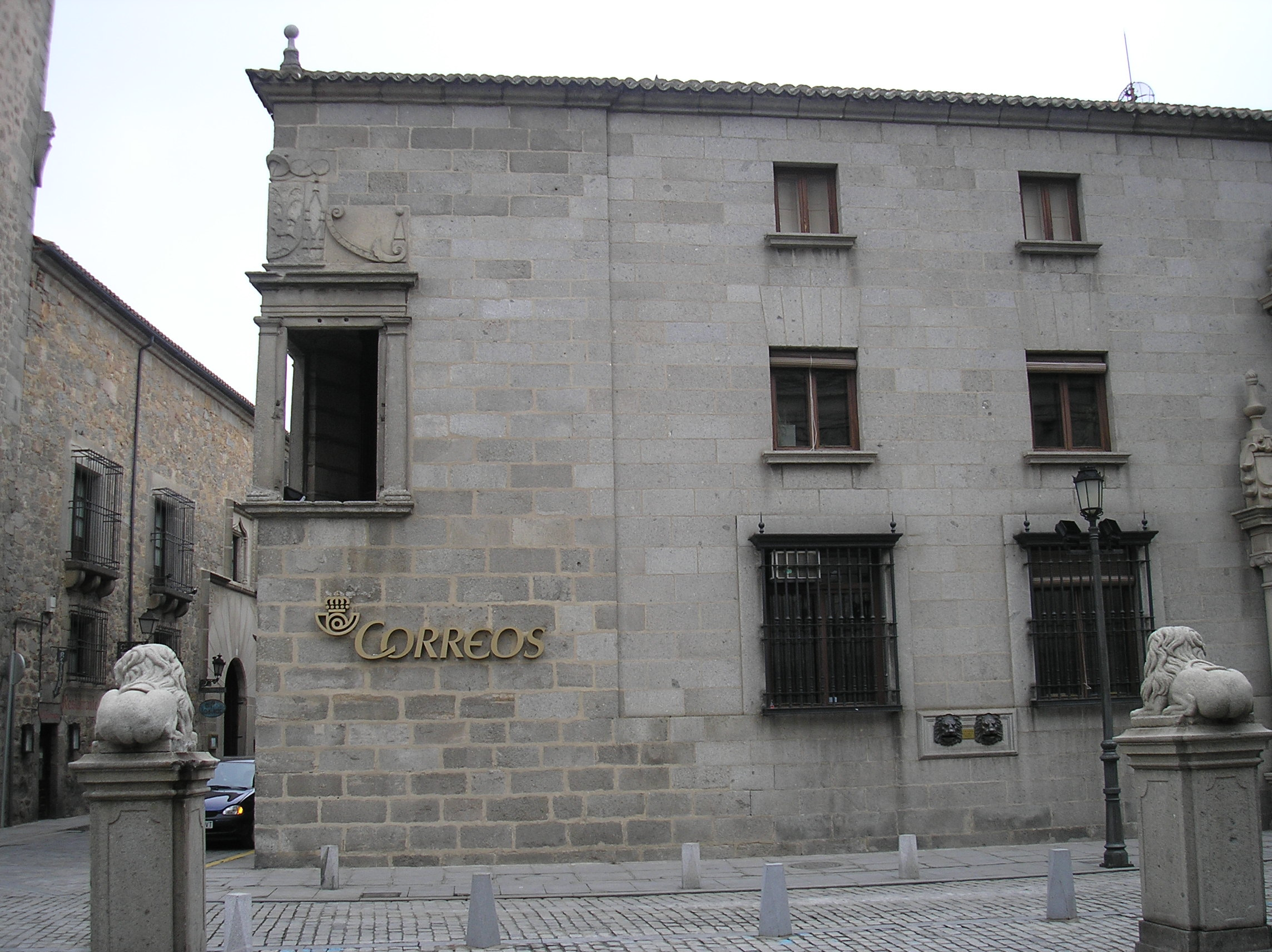 Edificio de Correos de Ávila, parte del antiguo Palacio del Rey Niño. Foto realizada por Jorge González.